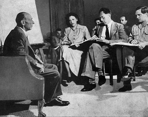 Österreichische MUSIKZEITschrift, Sonderband "Die Wiener Schule", Anmerkung: Das Foto ist vom Fotografen Richard Fish zwischen 1944 und 1948 aufgenommen. Es wurde nachweislich 1951 in The Musical Quarterly veröffentlicht und später mit einem Copyright-Vermerk 1953 wiederholt veröffentlicht. Der Crop hier stammt von der Titelseite der ÖMZ 1961, die Person, die das Titelbild nach Commons hochgeladen hat, behauptet in einem OTRS-Ticket, über die Rechte an dem Bild zu verfügen. Dies wurde zuletzt hier als plausibel bewertet.